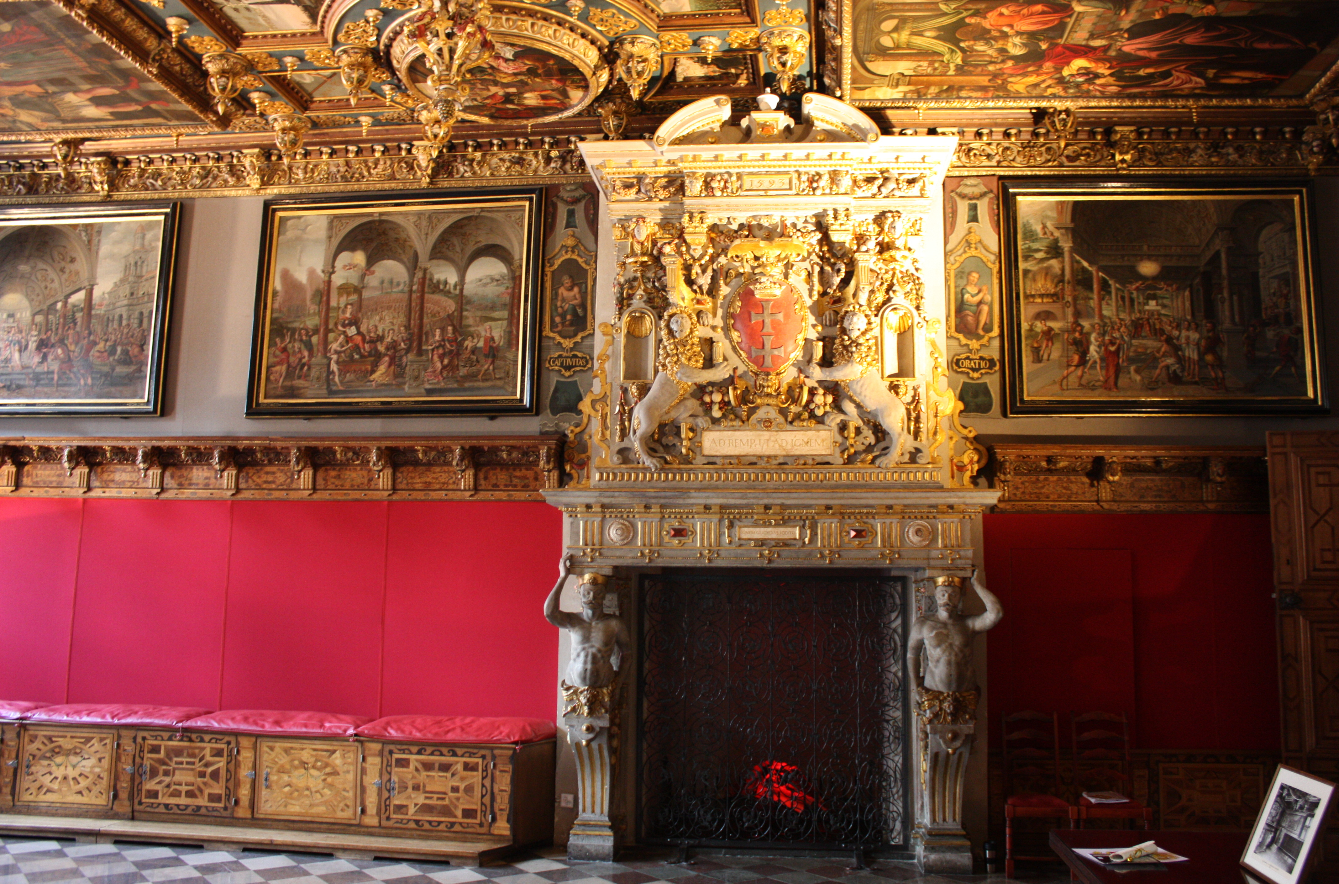 Gdańsk, ratusz Głównego Miasta, ob. Muzeum Historyczne, 1378-XV